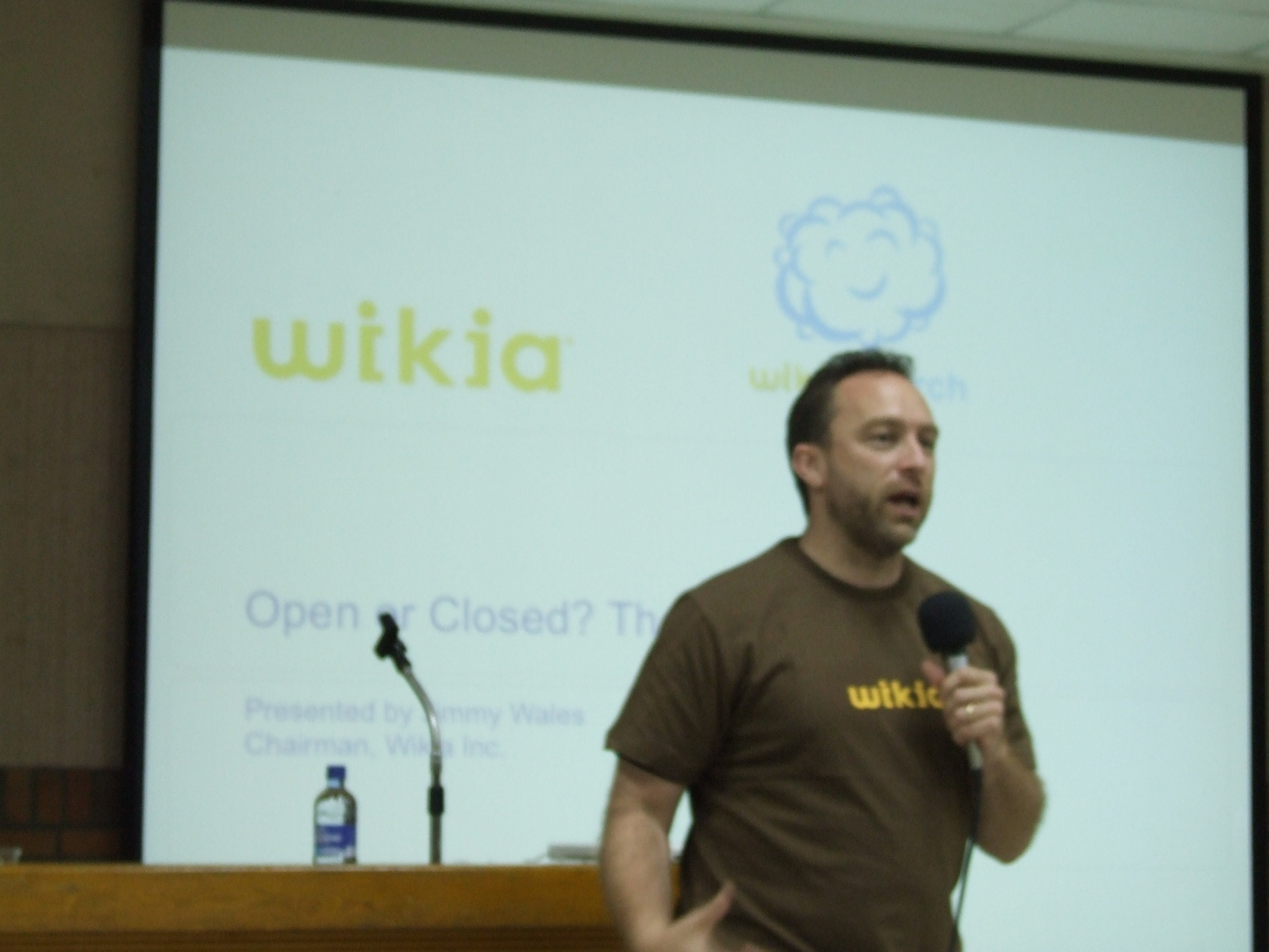 Jimbo Wikia presentation at Wikimania 2007